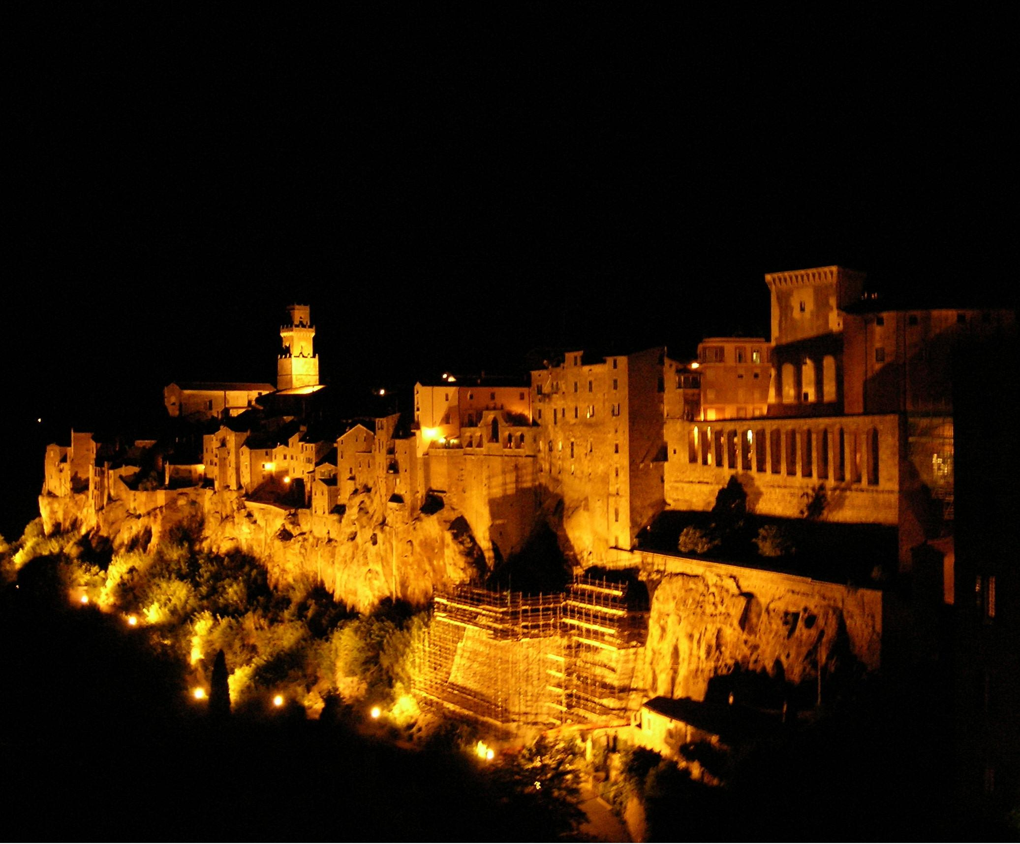 Pitigliano, Italy, at night